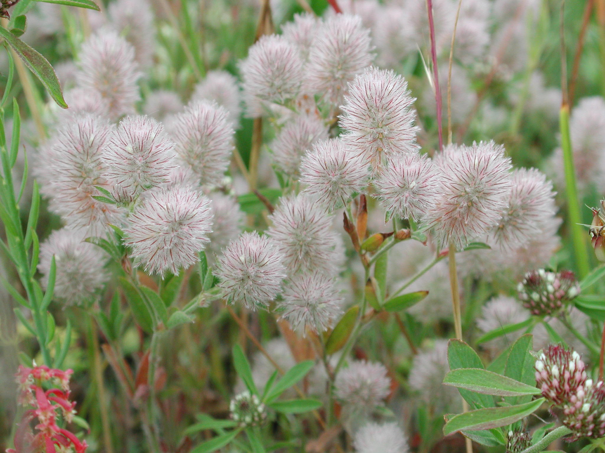 Inforiescenze di Trifolium arvense